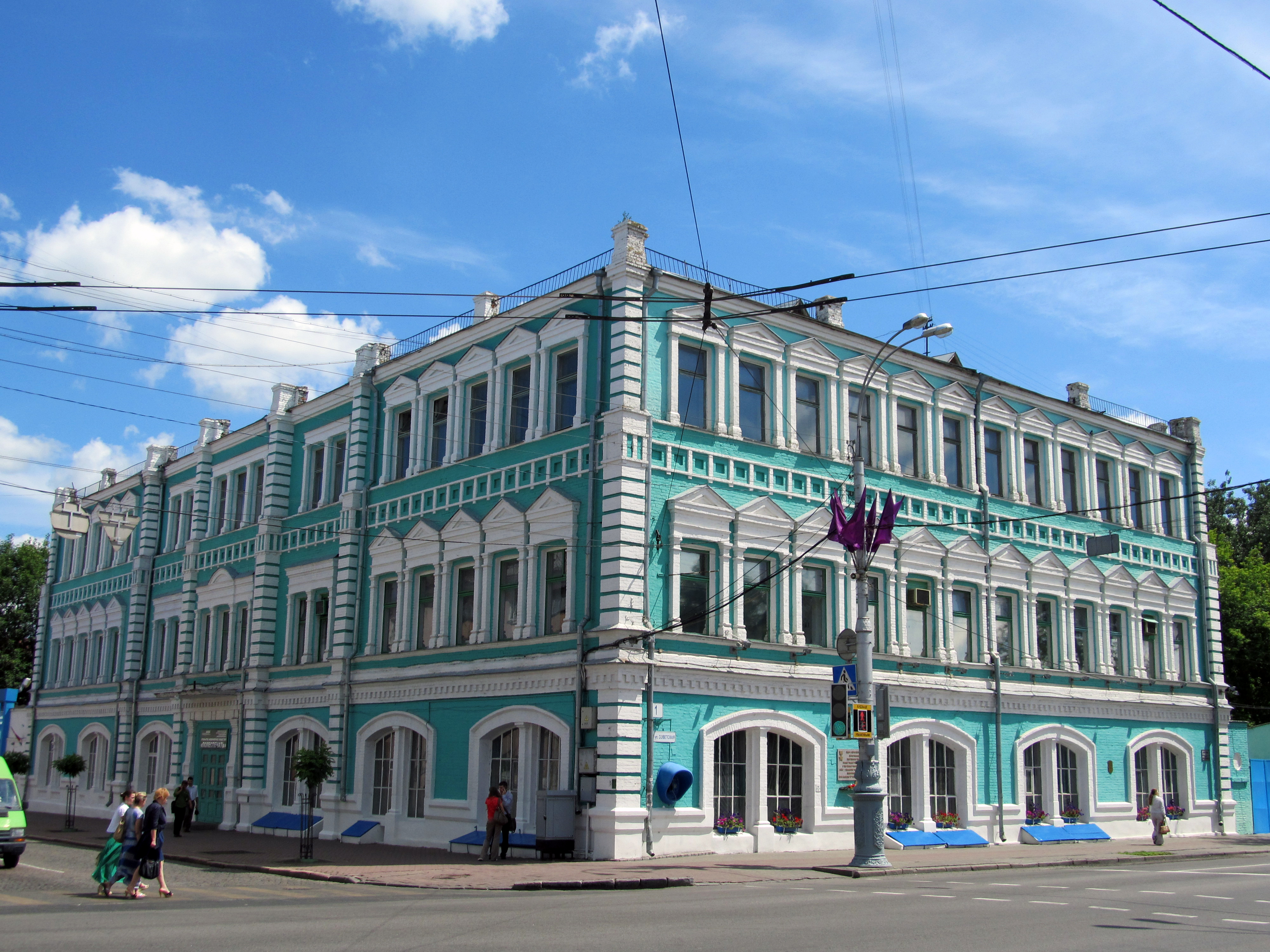 Беларуская (тарашкевіца): Забудова вул. Савецкай. г. Гомель This is a photo of Belarusian heritage monument. Reference number: 313Г000073 ( WLM)